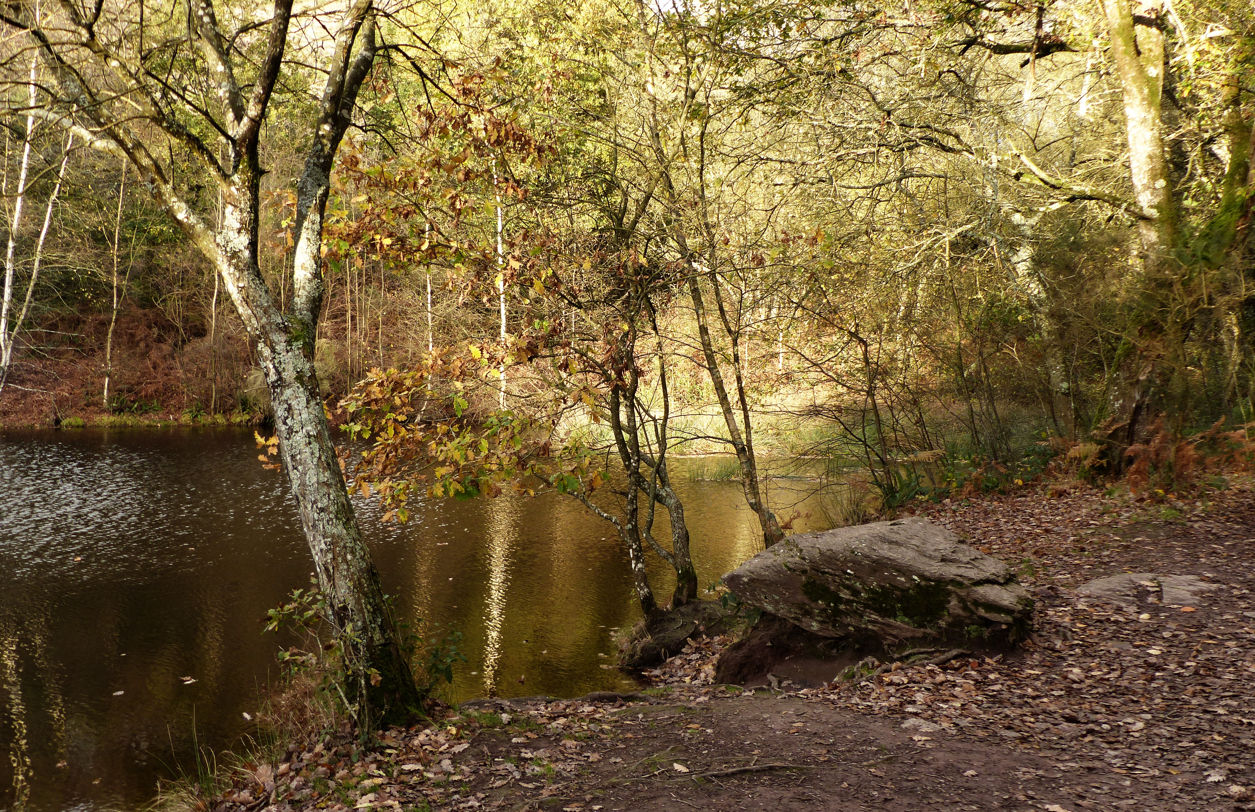 Le Val sans retour derrière le Miroir aux fées, automne 2017, Bretagne